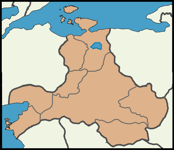 1923 yılındaki sınırlara göre Balıkesir il haritası. Diğer Balıkesir haritalarından yararlanılmıştır.